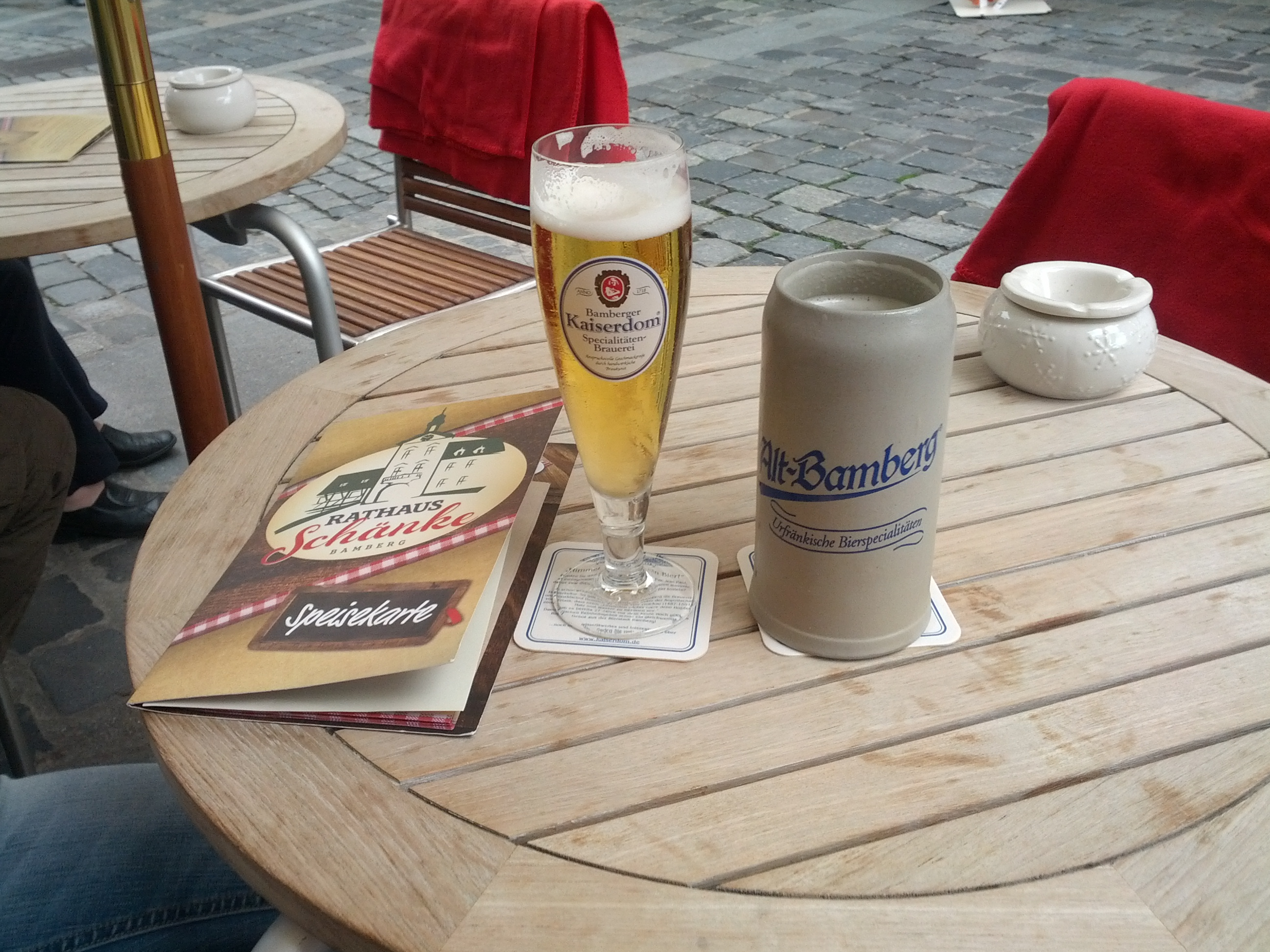 Bier der Bamberger Brauerei Kaiserdom